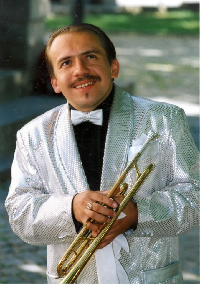 Slovenčina